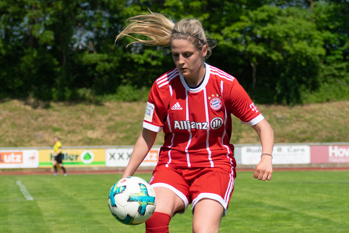 Elisabeth Mayr at FC Bayern München (women) vs Schott Mainz (women)